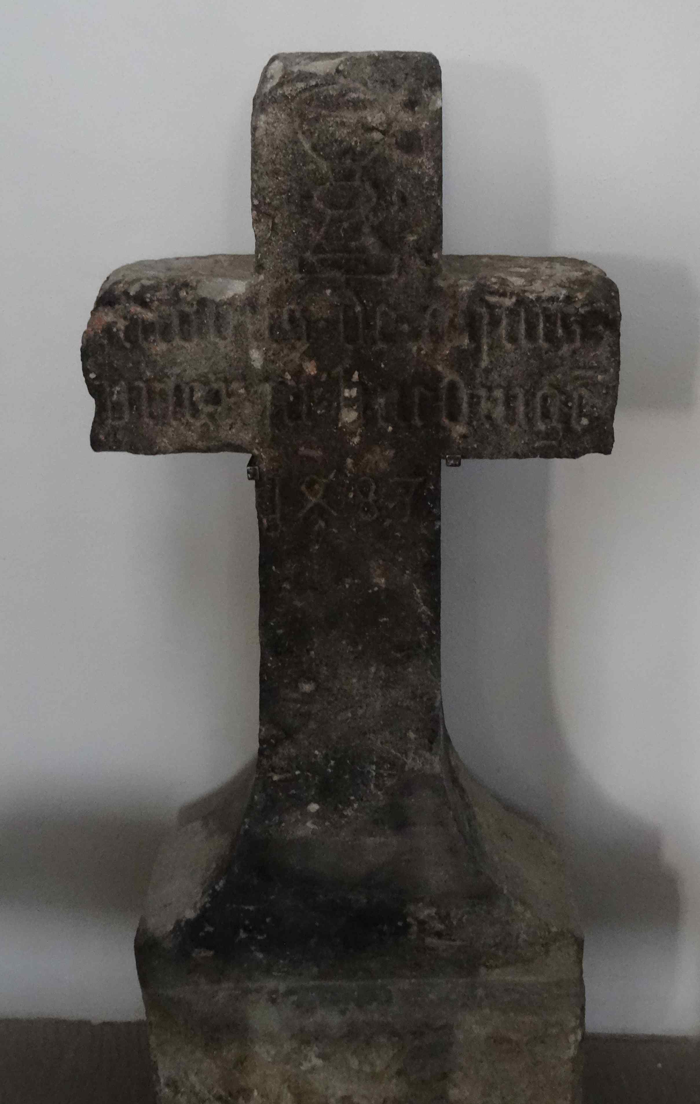 Wegekreuz im nördlichen Querschiff